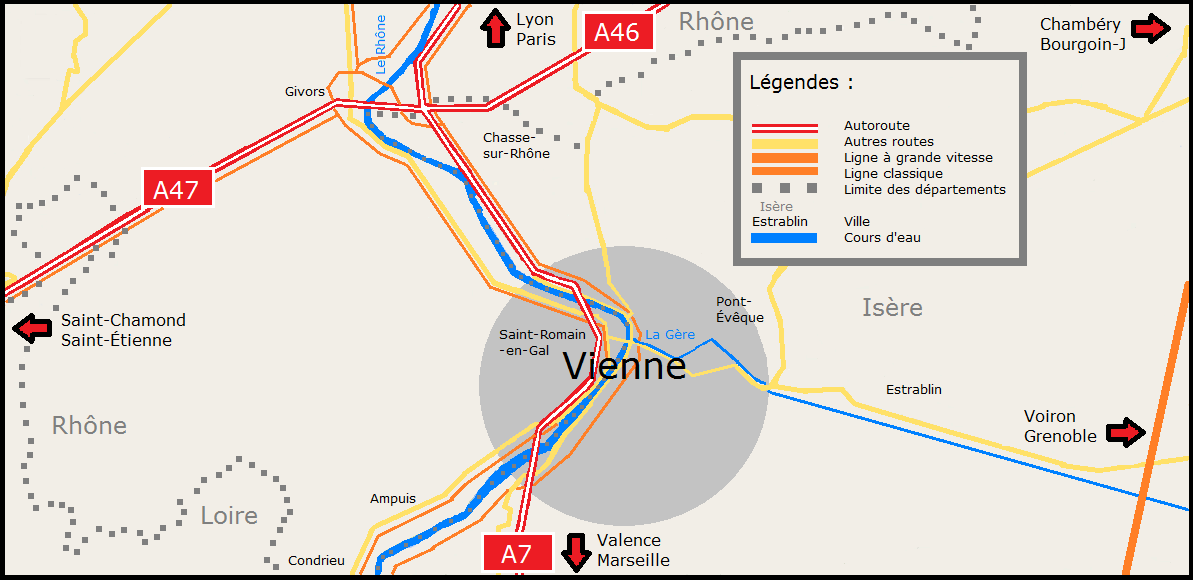 Axes routiers et ferroviaires autour de Vienne.